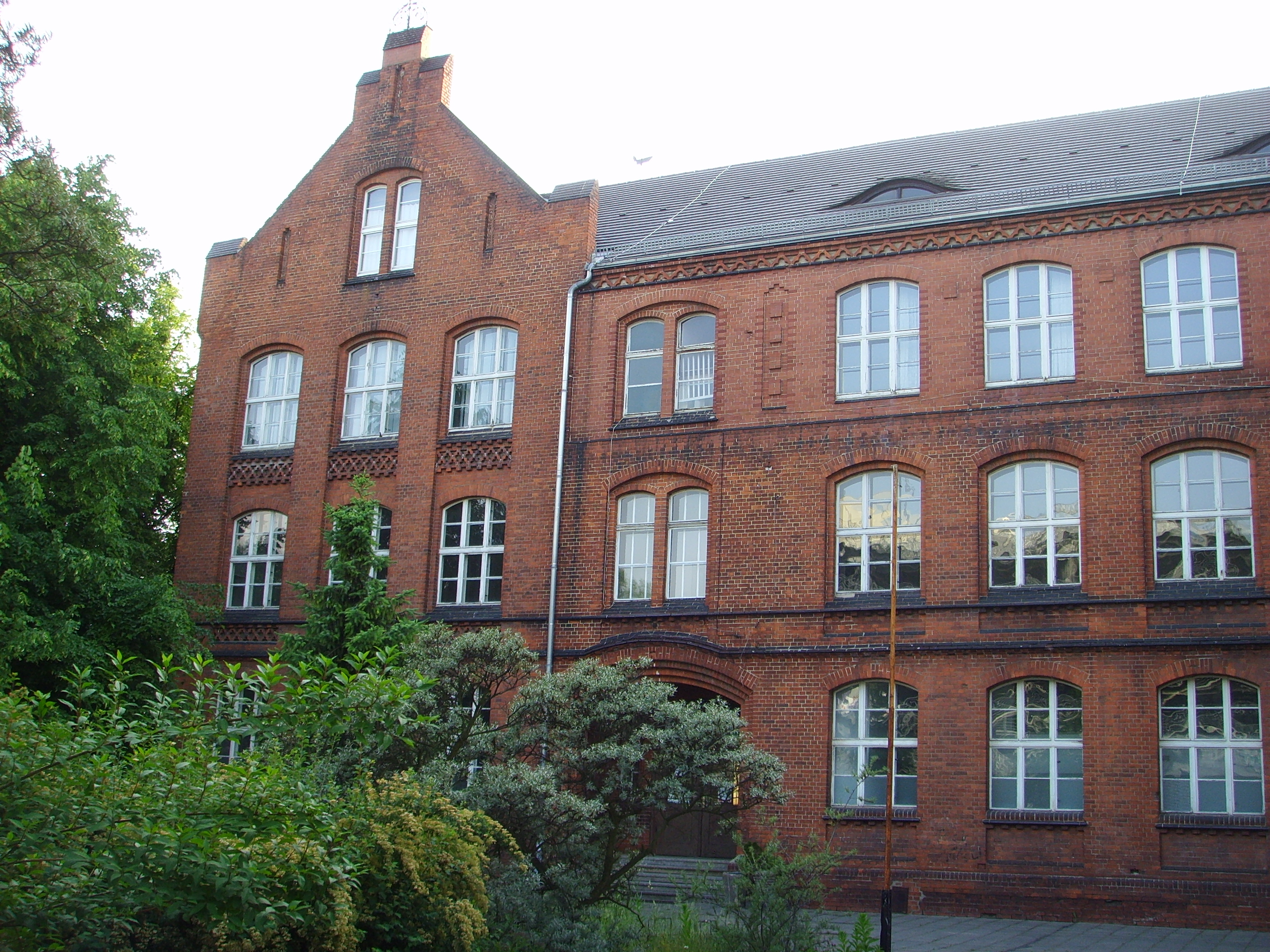 Das Gebäude der ehemaligen Realschule in Senftenberg, davor POS I Artur Wölk und davor Volksschule I